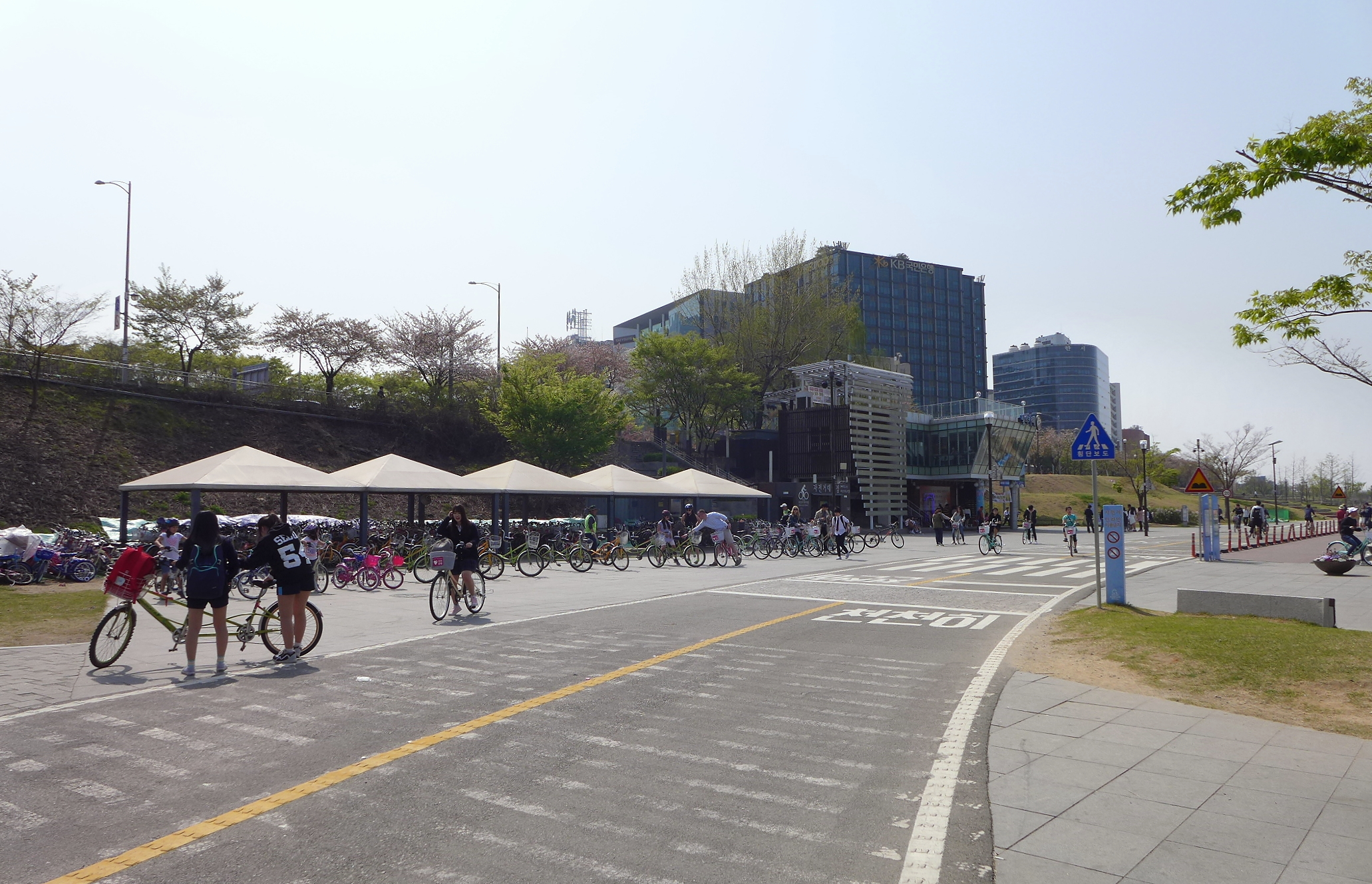 Hangang Park